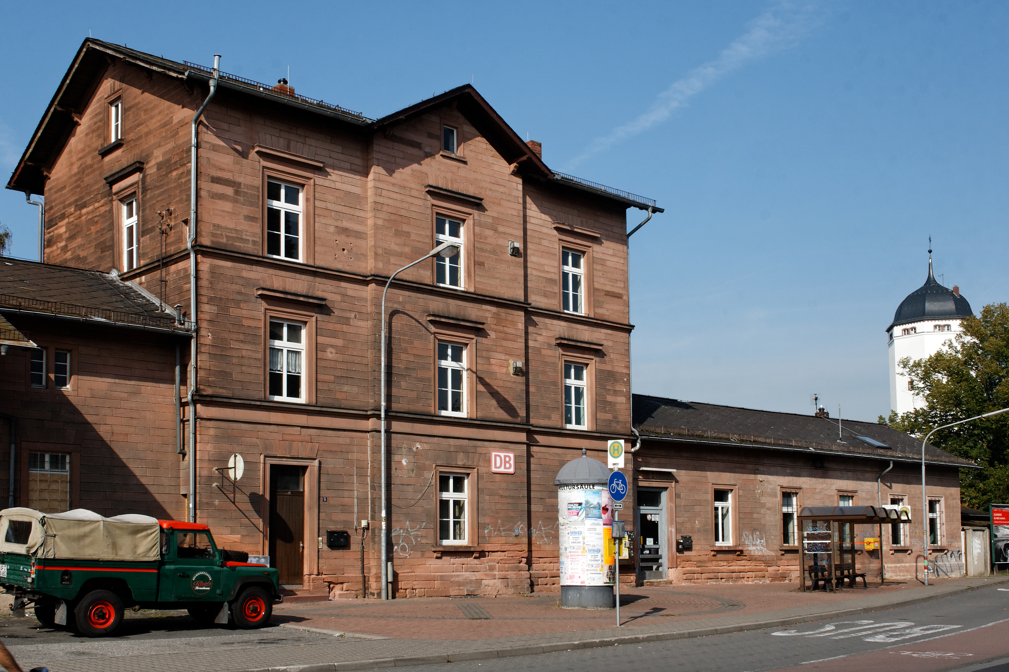 Ehemaliges Empfangsgebäude des Bahnhofs in Seligenstadt (Hessen).